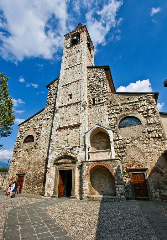 La Pieve di Sant'Andrea a Iseo - Italia.